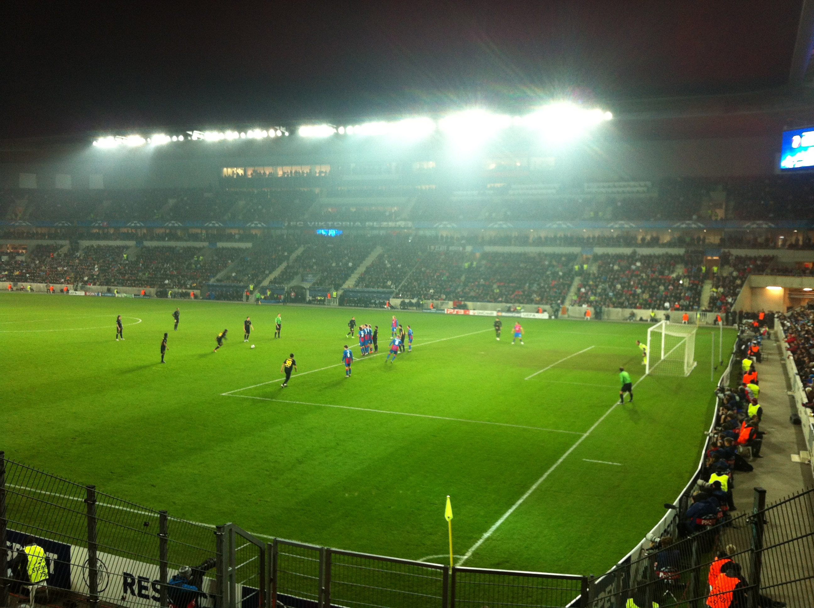 01-Nov-2011 Viktoria Plzen - FC Barcelona 0:4 Synot Tip Aréna, Praha